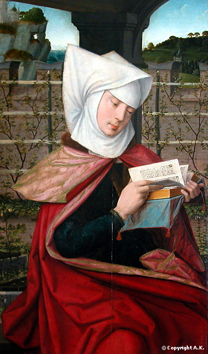 Sainte Émérencie Jan Provost 01